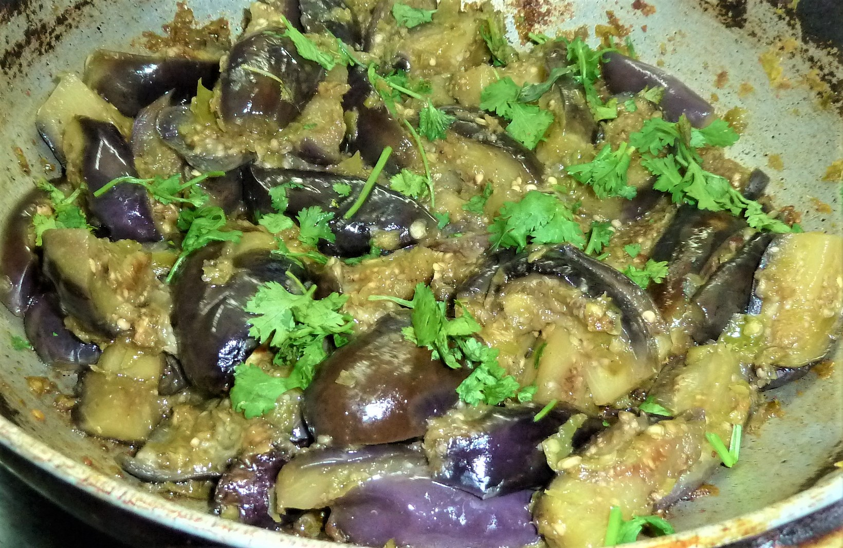 వంకాయ అల్లం, పచ్చిమిర్చి కూర